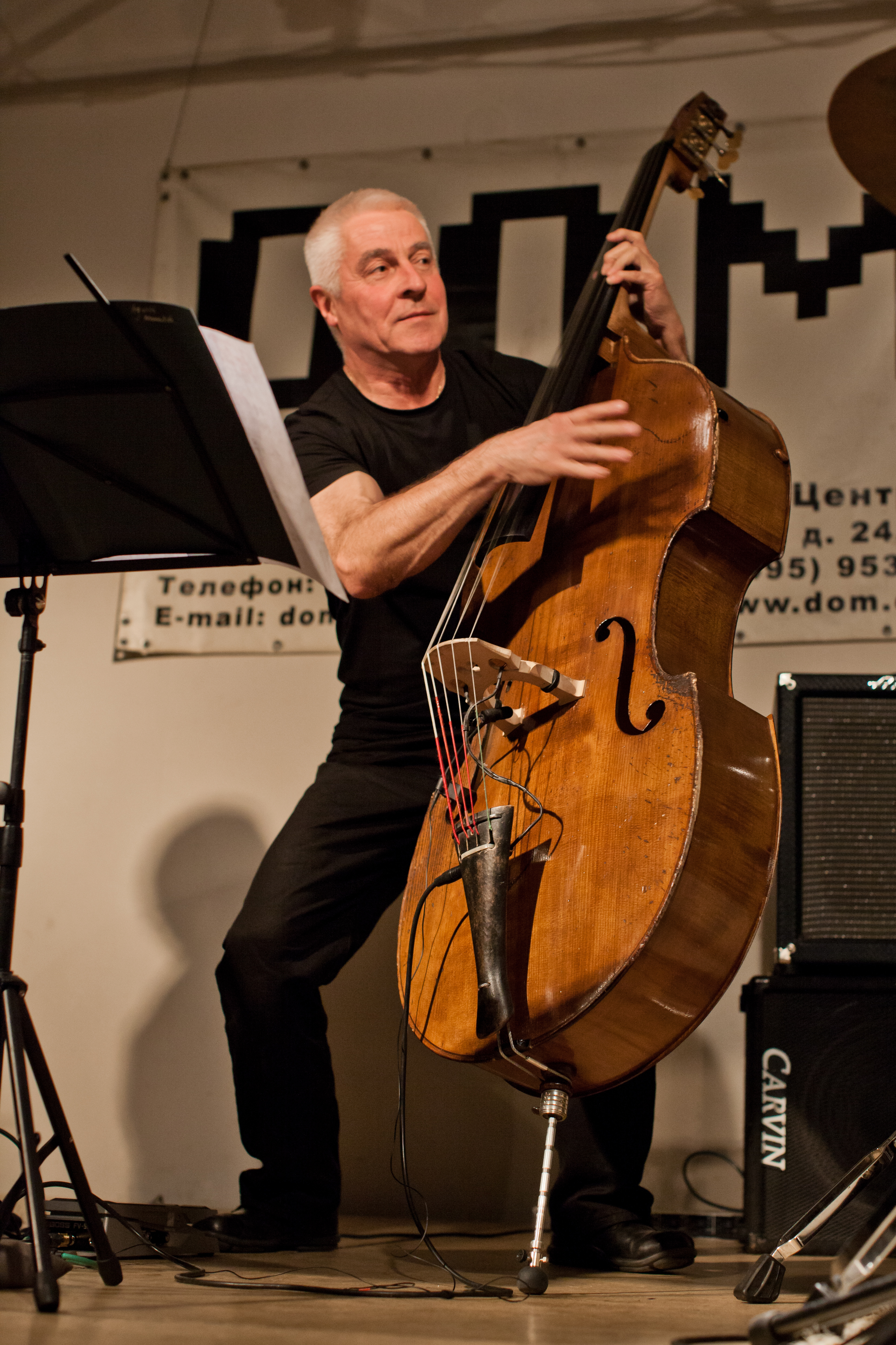 Aurora Trio (Barry Guy, Agustí Fernández, Ramon Lopez) in Moscow